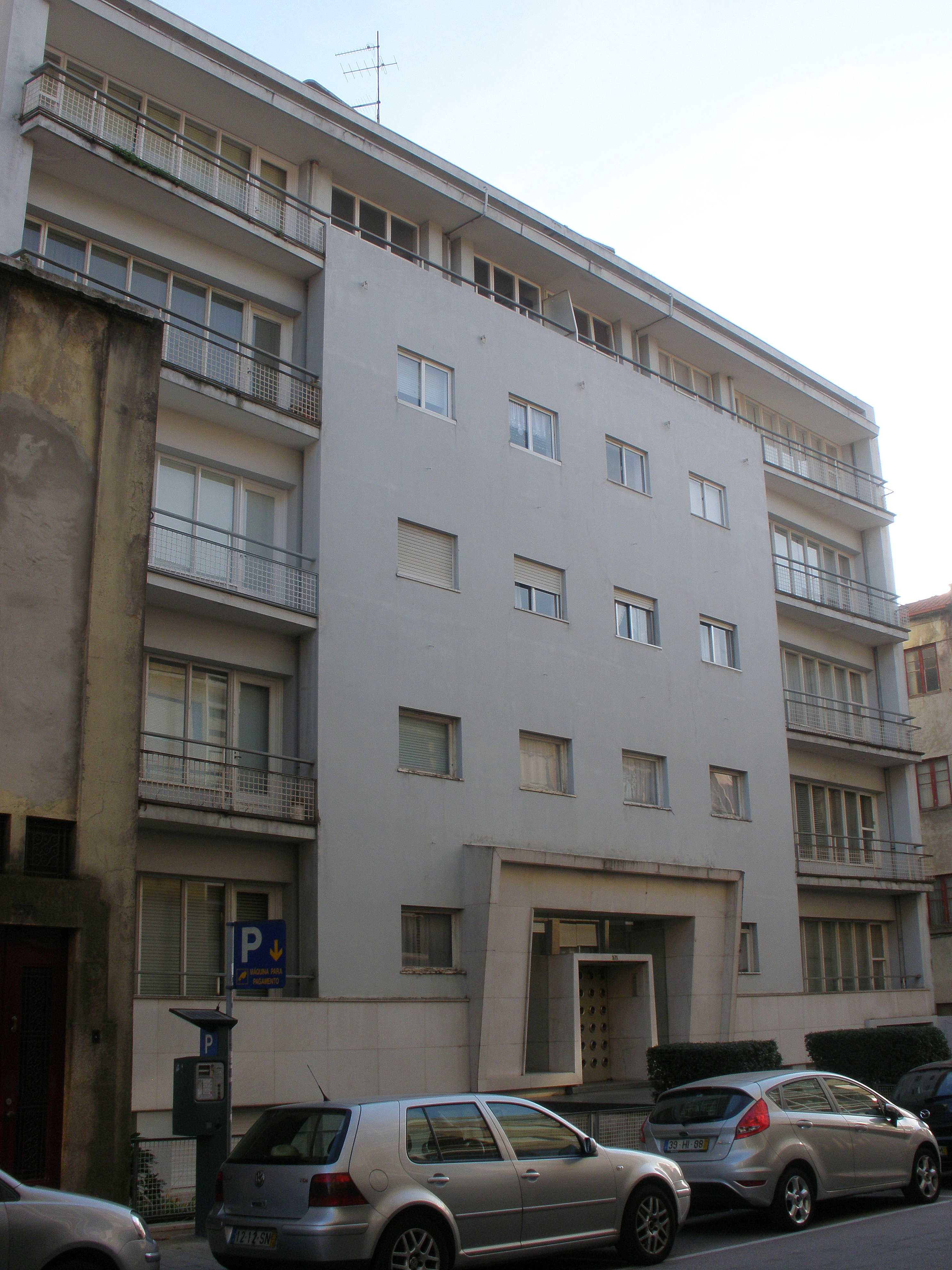 Bloco da Carvalhosa, de Cassiano Barbosa e Arménio Losa (1945-50), na Rua da Boavista, Cedofeita, Porto, Portugal. This file was uploaded for Wiki Loves Monuments in Portugal with the unique identifier 330416.